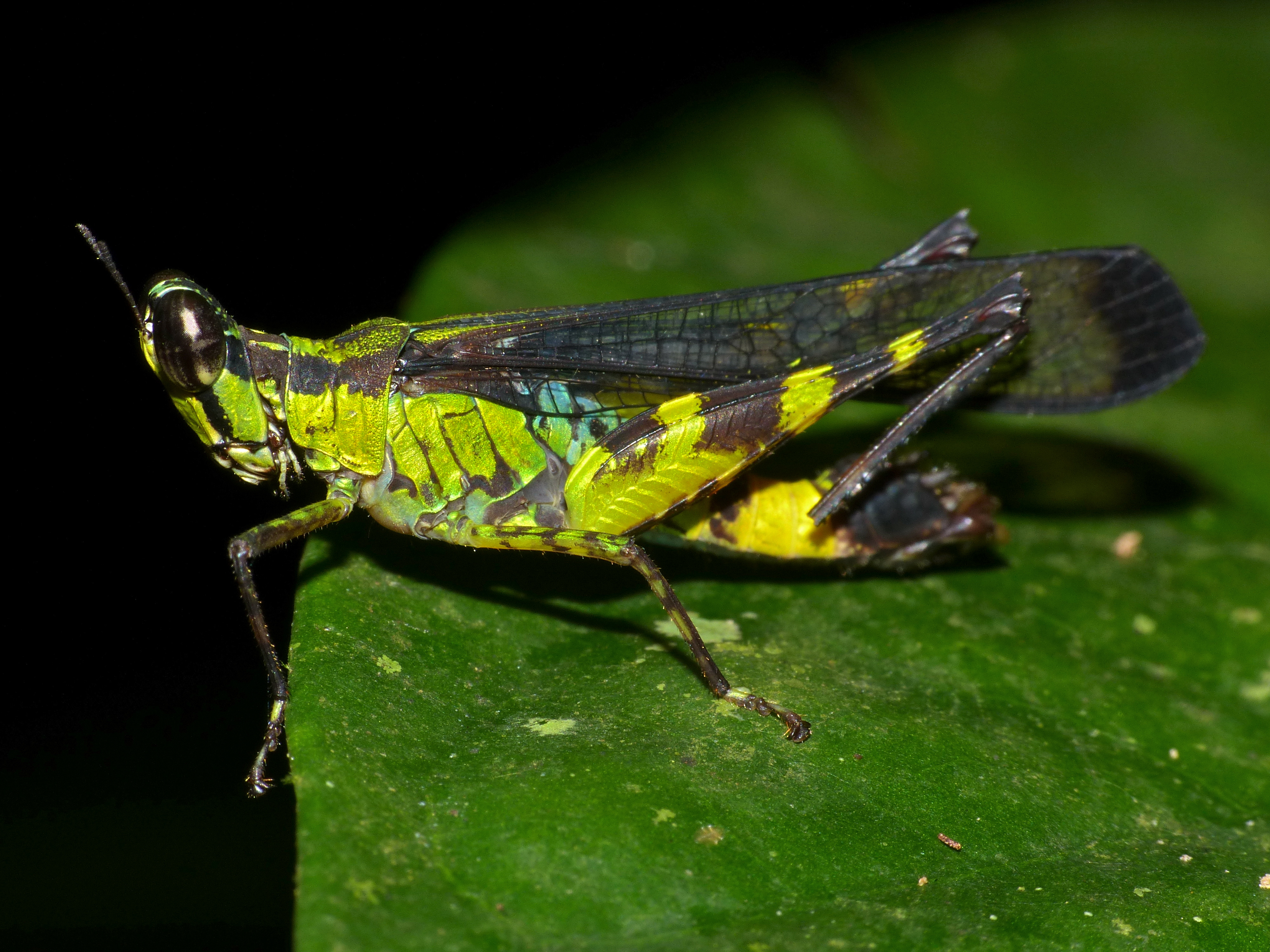 Botanic Trail, Mulu NP, Sarawak, MALAYSIA